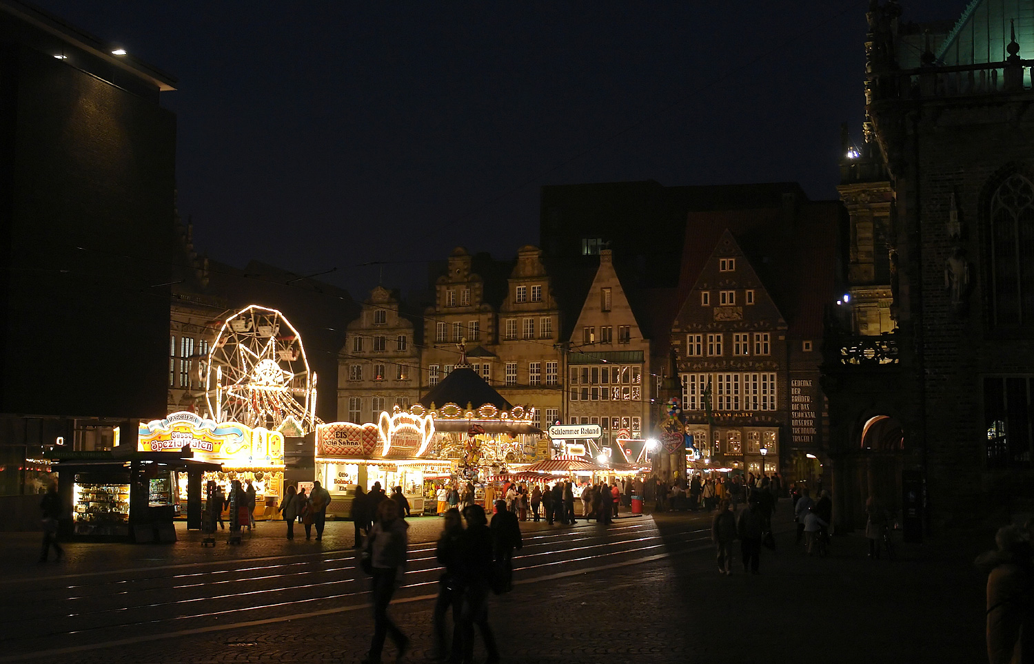 Der Kleine Freimarkt auf dem Bremer Marktplatz. Blick aus Richtung Dom.